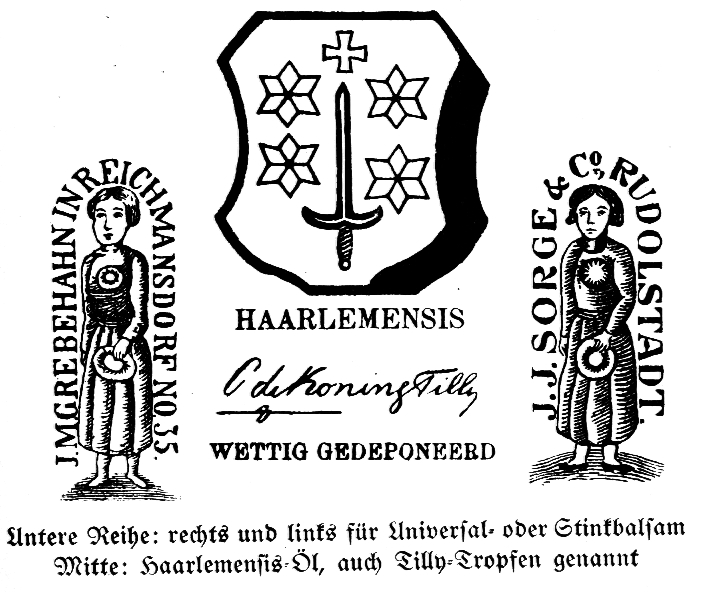 Beispiele von Etiketten für Olitäten bzw. Apothekerfläschchen